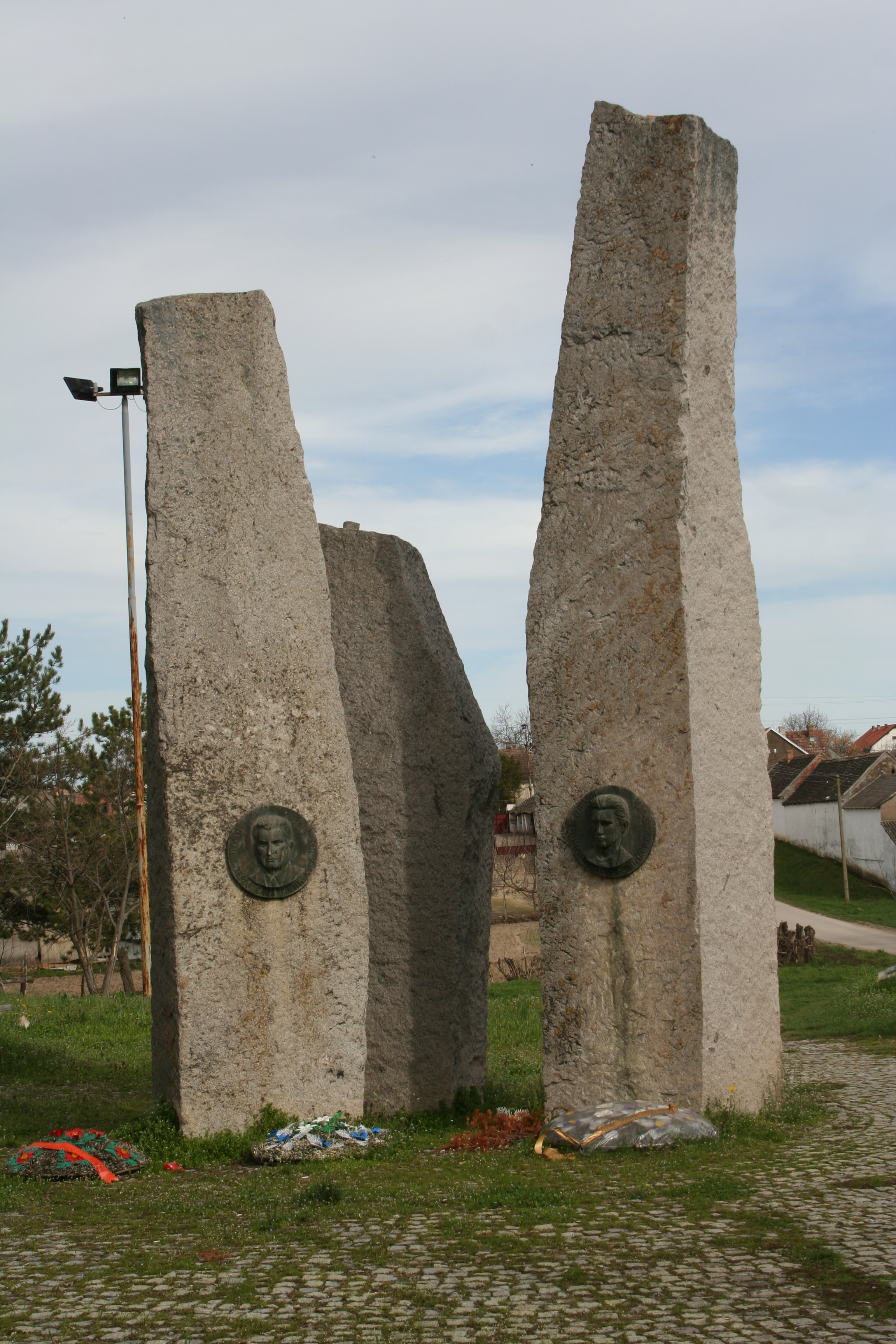 Crkva Sv. Georgija (Manđelos)